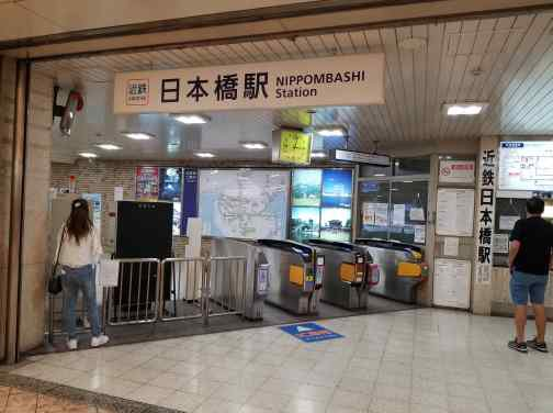 近鉄難波線・近鉄日本橋駅のなんばウォーク改札口。